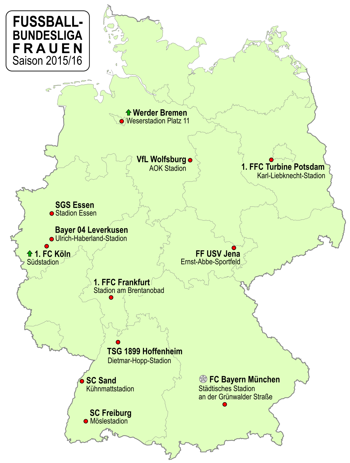 Karte der Vereine der Frauen Fußball-Bundesliga-Saison 2015/2016